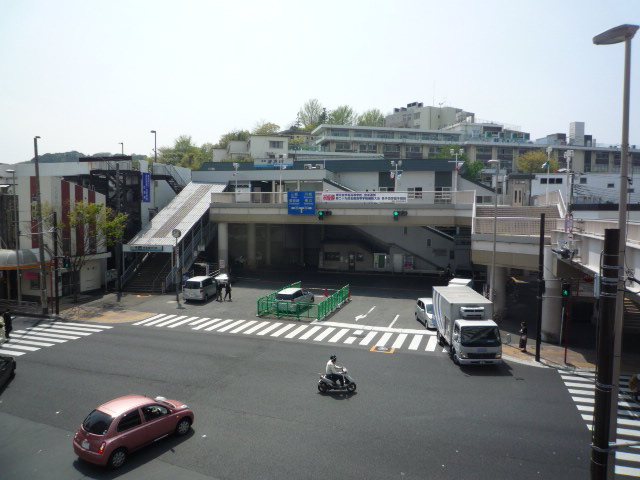 追浜駅前